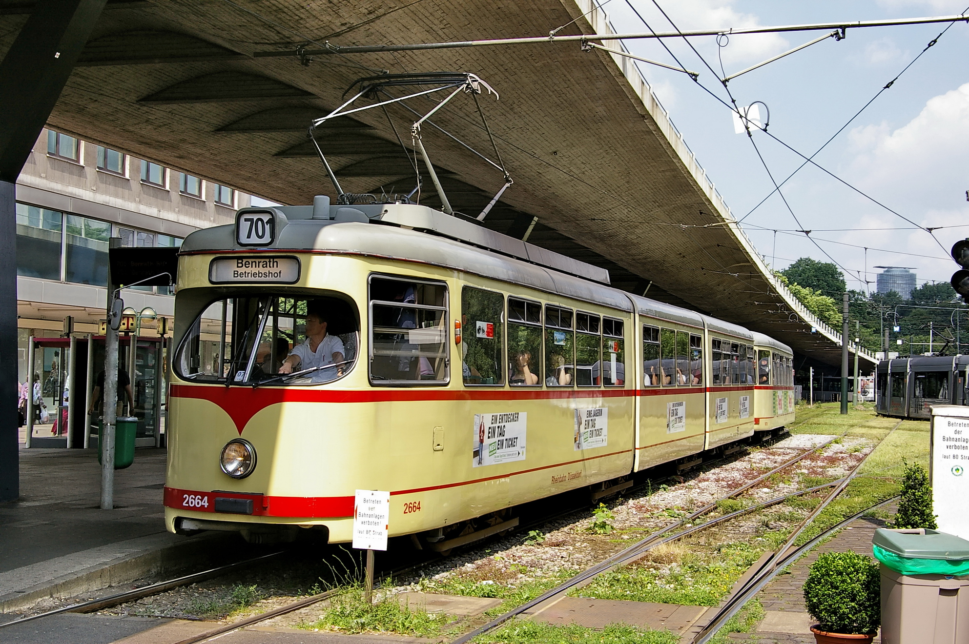 Tausendfüßler in der Düsseldorfer Innenstadt, darunter Straßenbahn der Rheinbahn